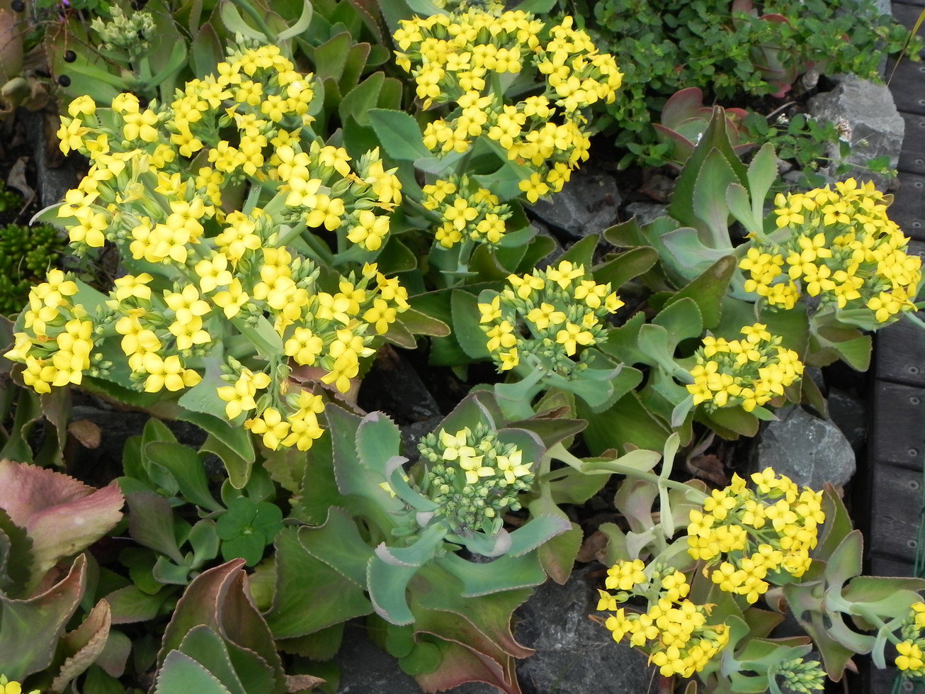 Plante cultivée en Nouvelle-Calédonie : fleurs de Kalanchoe spathulata